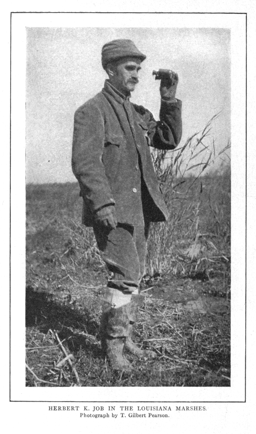 Herbert K Job